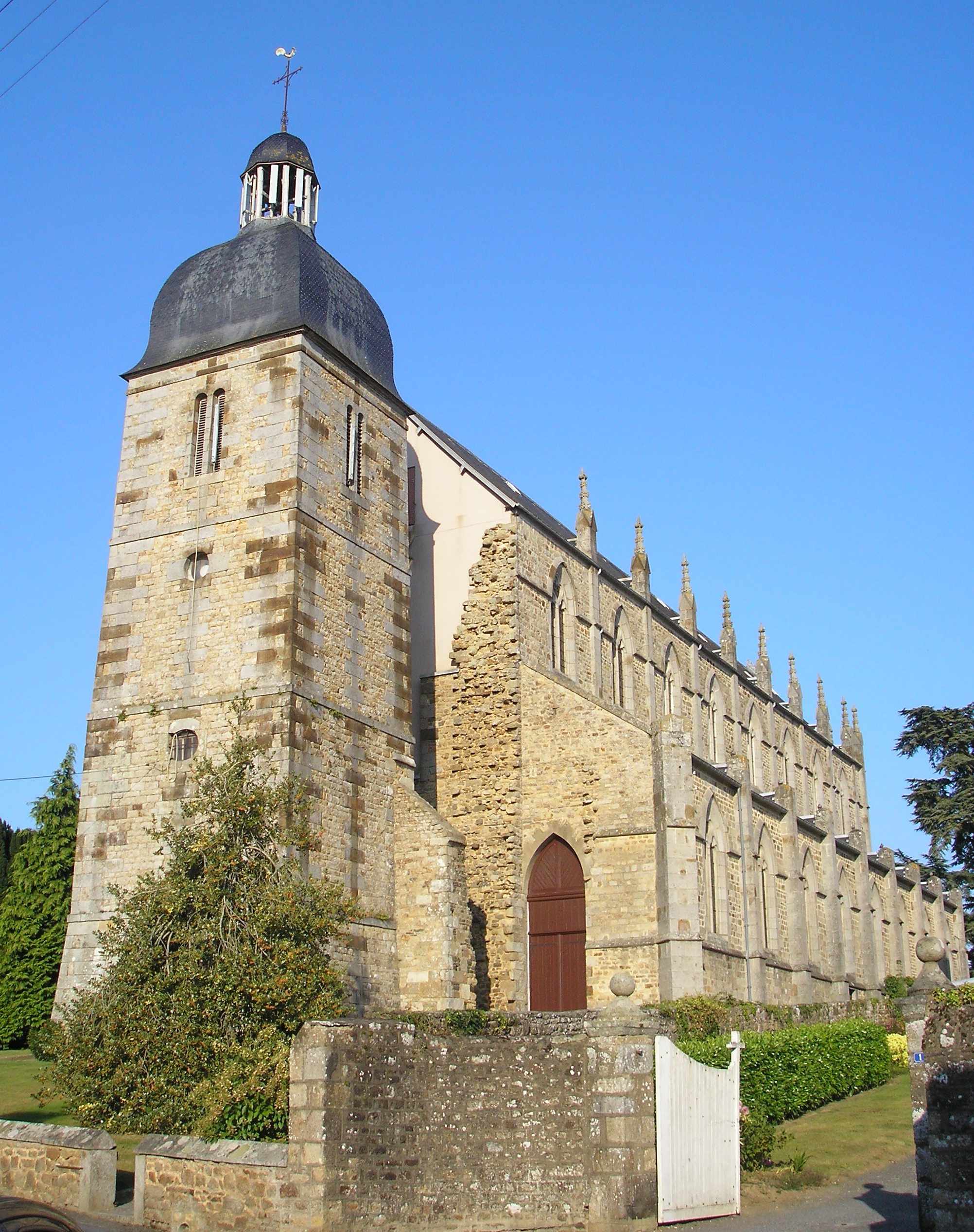 Ducey (Normandie, France). L'église Saint-Pair.